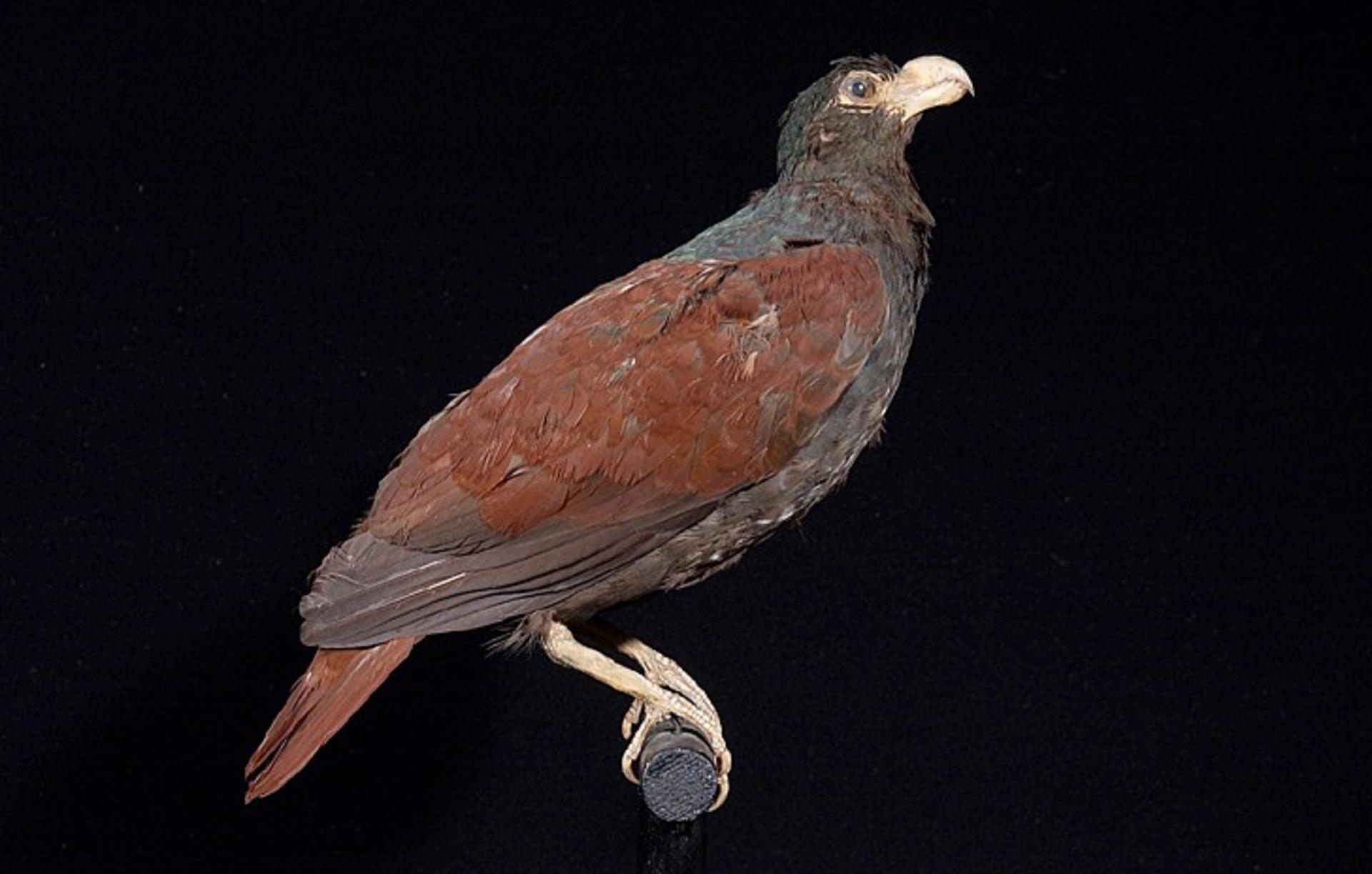 Didunculus strigirostris Jardine, 1845